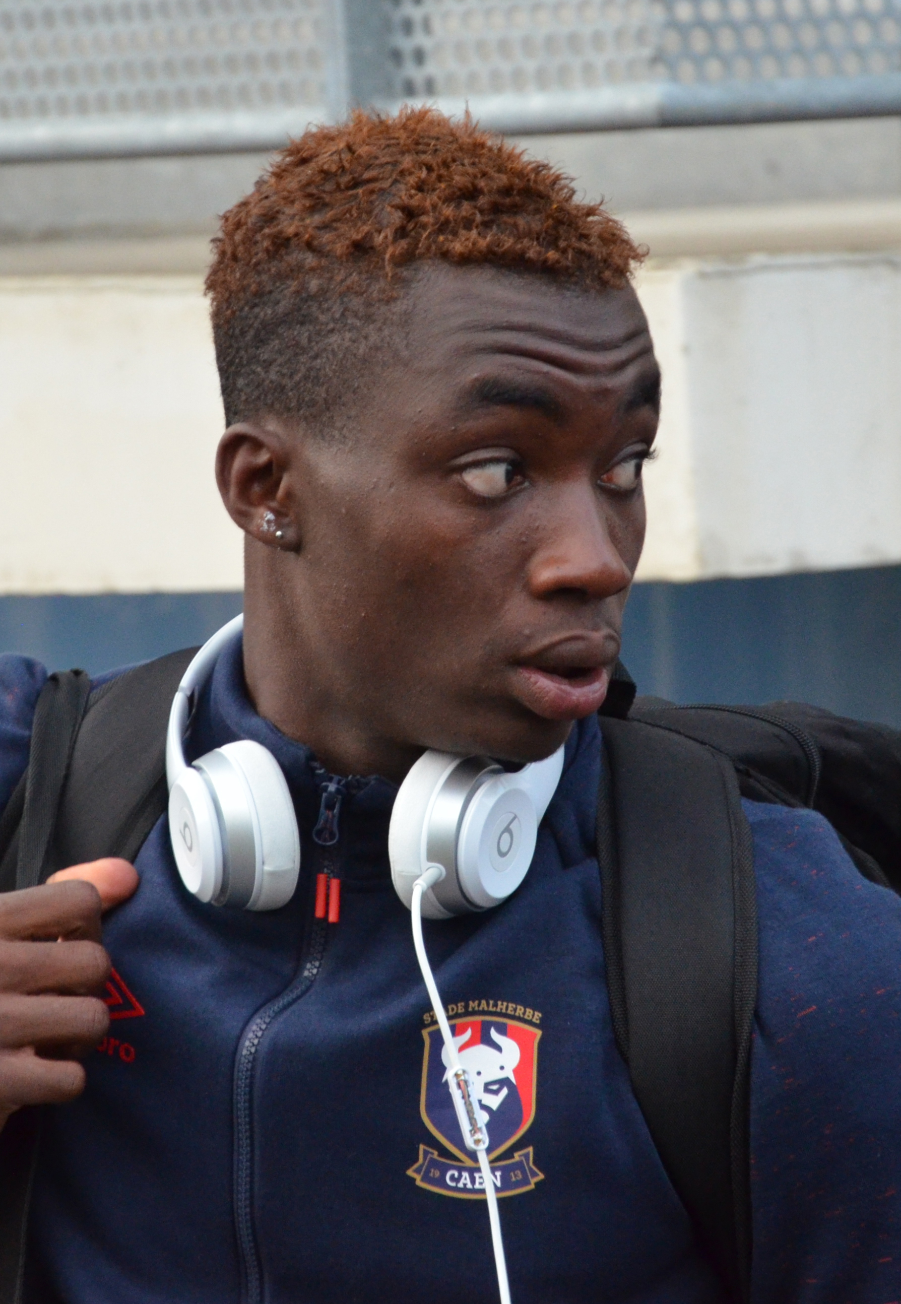 Photographie prise lors du match opposant le SM Caen à l'UNFP en match amical au stade Louis-Villemer de Saint-Lô le 30 juillet 2016. Ici, Yann Karamoh.